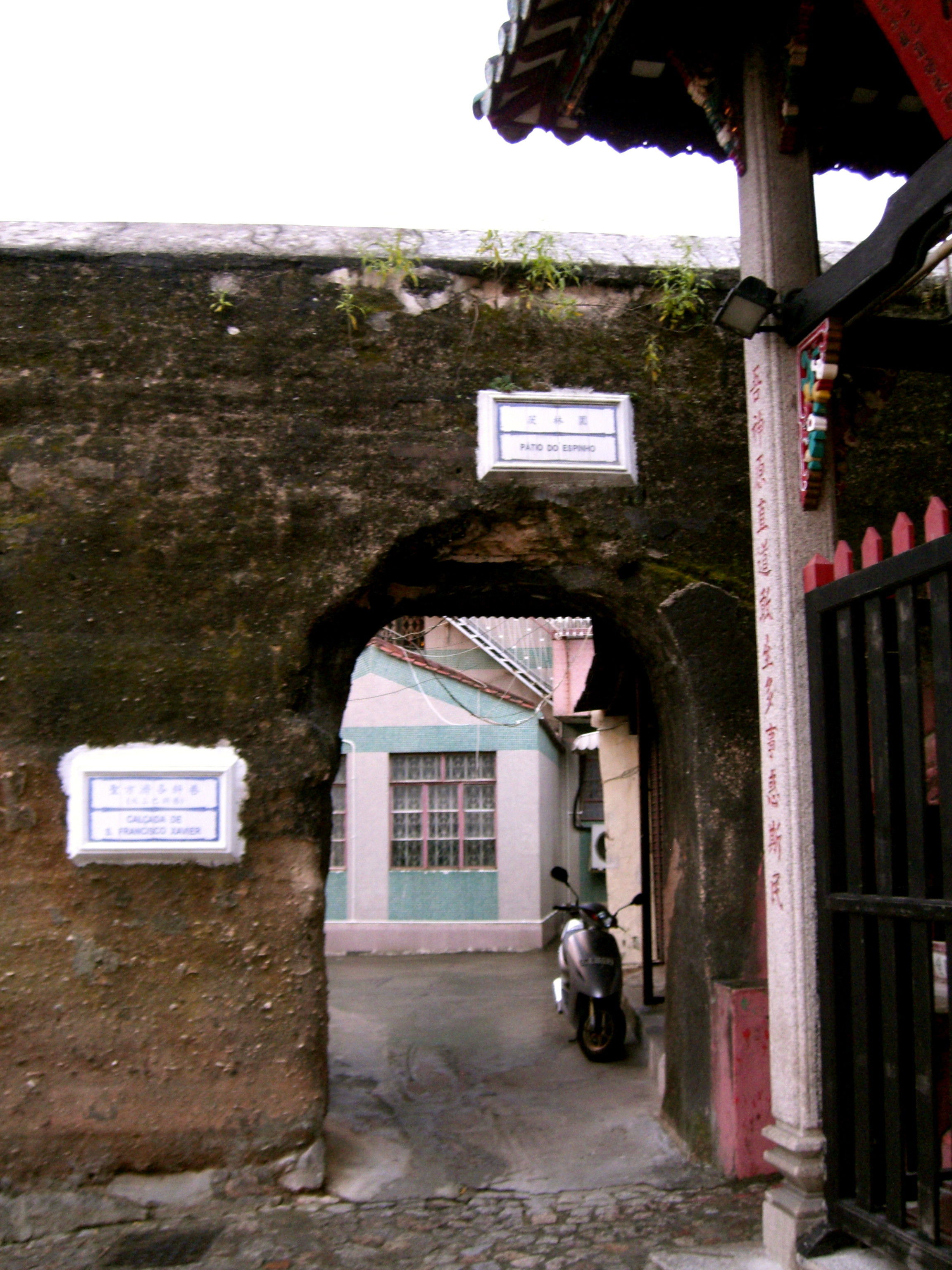 Patio Do Espinho